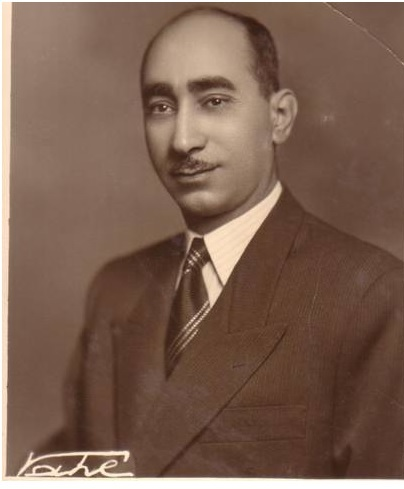 عبد القادر السيد محمود